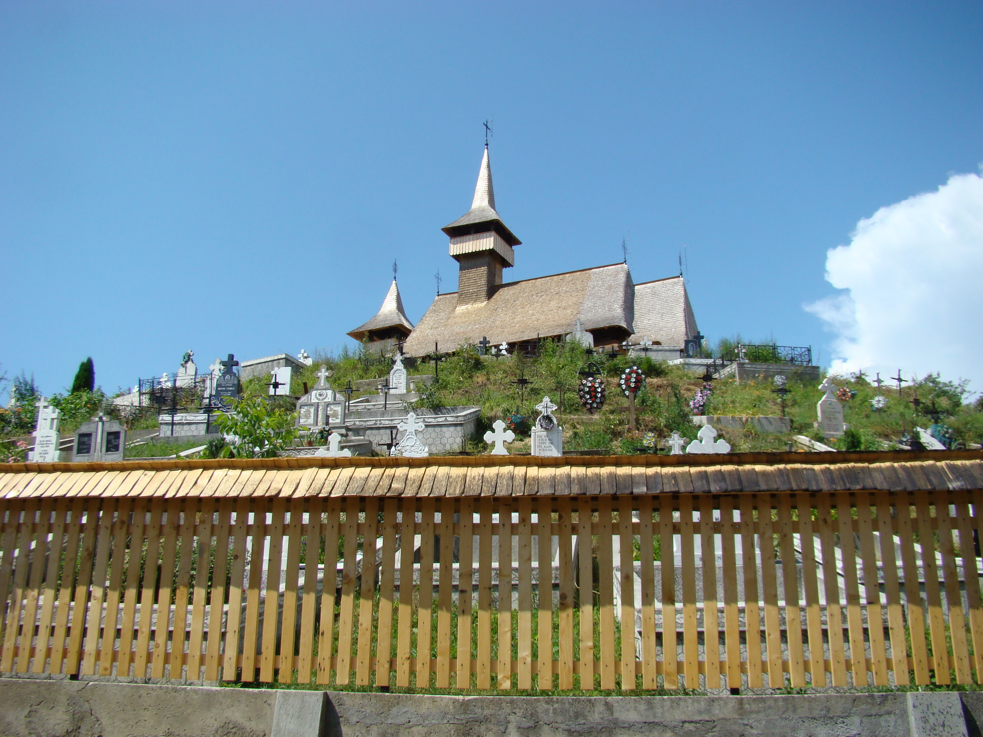 Biserica de lemn "Sfântul Nicolae" (a Nistoreştilor) , oraş SĂLIŞTEA DE SUS